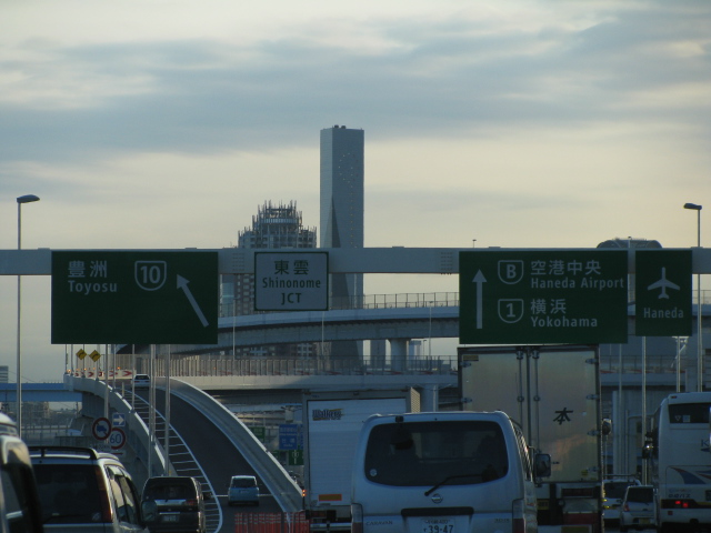 2009年8月11日、東雲ジャンクション付近で湾岸線浦安方面より撮影